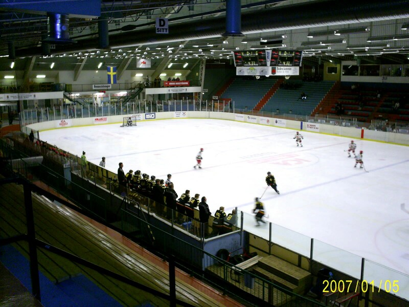 Björknäshallen, interior